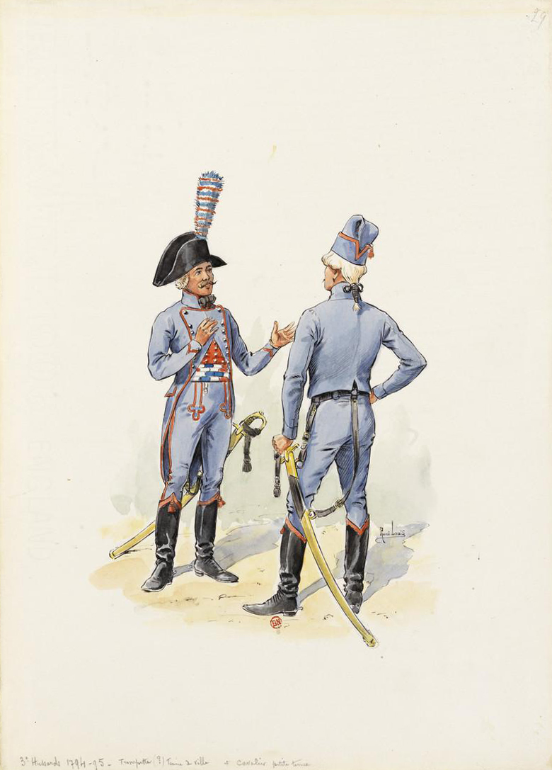 Trompette en tenue de ville et cavalier en petite tenue du 3e Hussards (1794-1795)